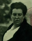 Hilda Pollak-Karlín kol. roku 1920